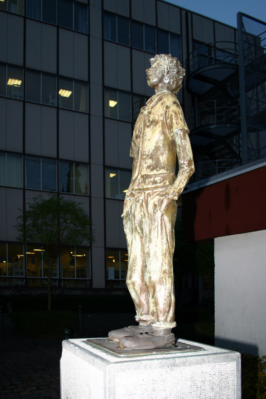 Statue of Pikke Stijkès in Tienen (Belgium)